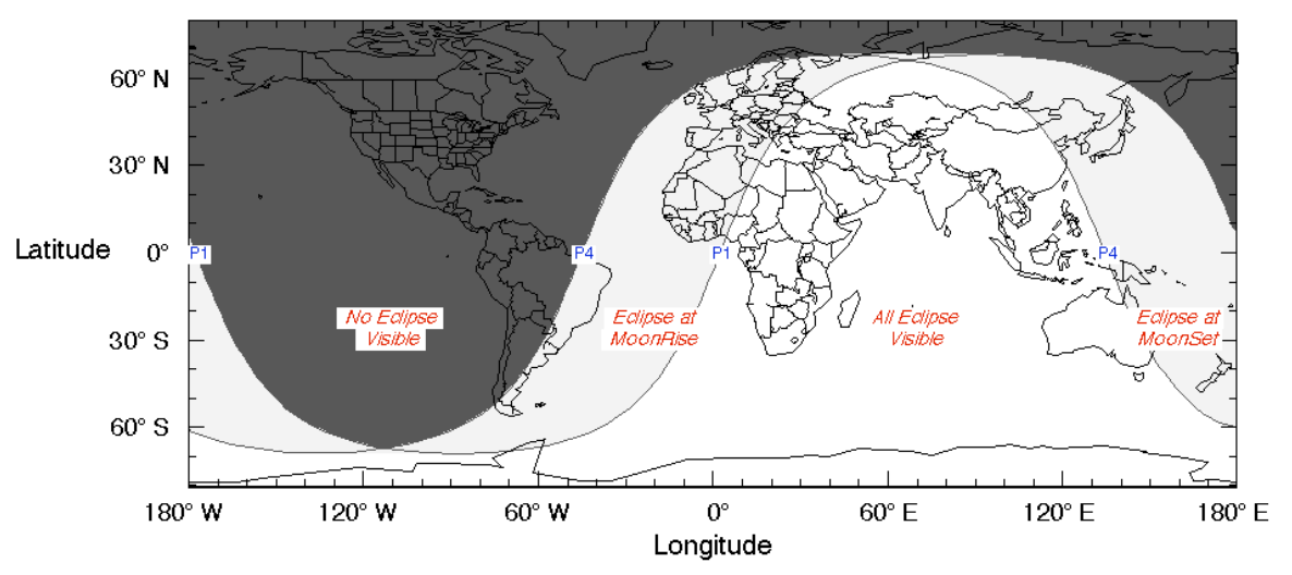 Eclipse 5 de junio 2020